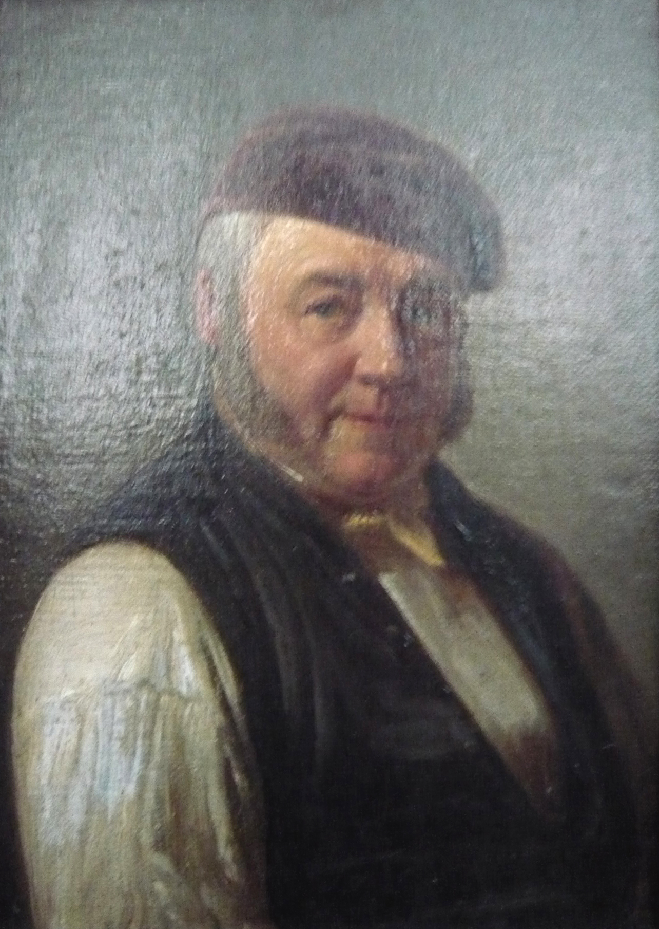 13 Kraus - Porträt Herr Kraus; Anton Kraus Hofvergolder und Kunsthändler der Düsseldorfer Malerschule - in Freundschaftsgalerie von Einzelbildnissen der Düsseldorfer Malerschüler und ihren Freunden (Vermächtnis des Künstlers)